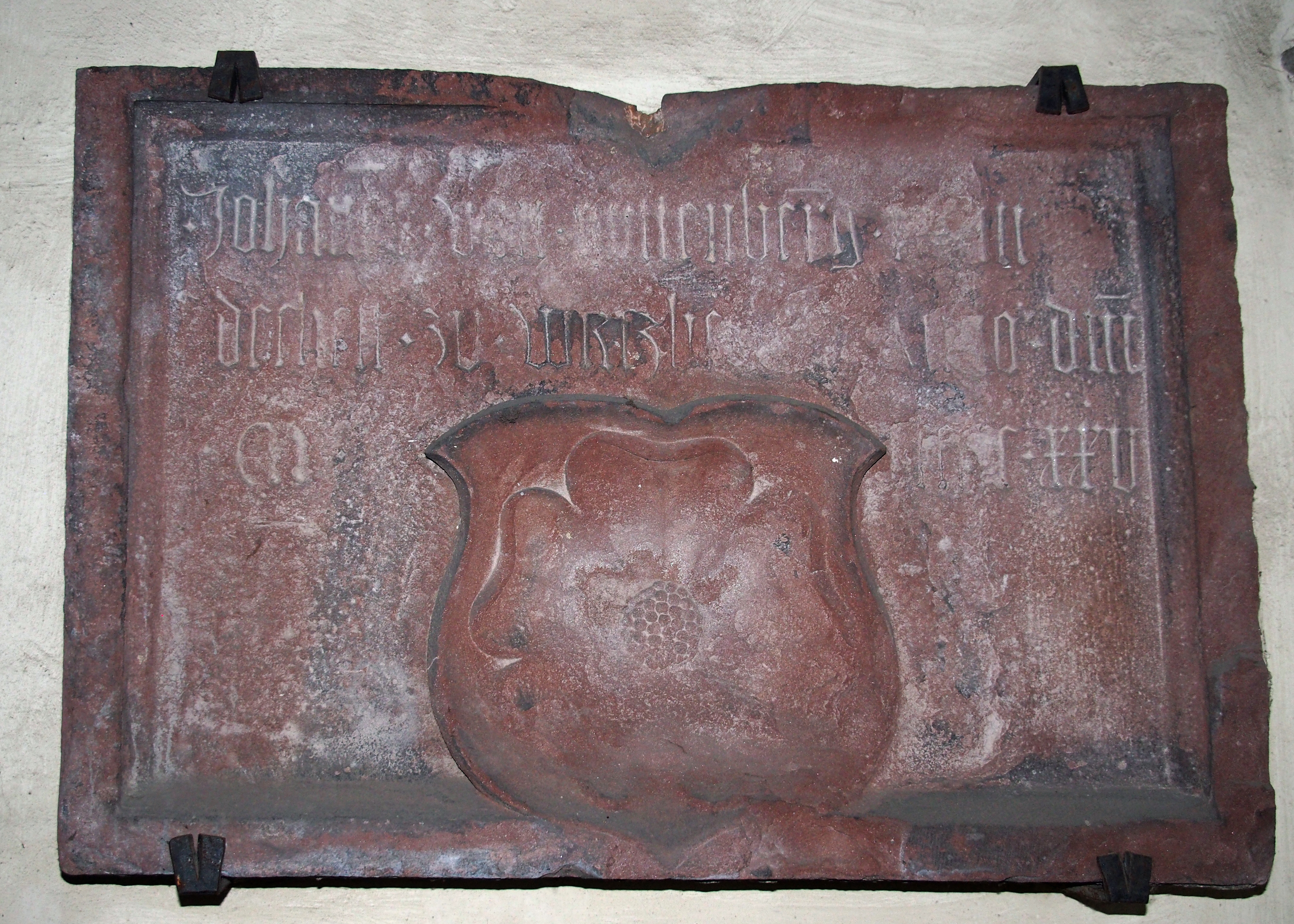 Wappen der von Guttenbergs am Eingang zum Marmelsteiner Hof in Würzburg. Inschrift: Johannes von Guttenberg thumdechett zu wirtzberg etc. Anno dmni 1525